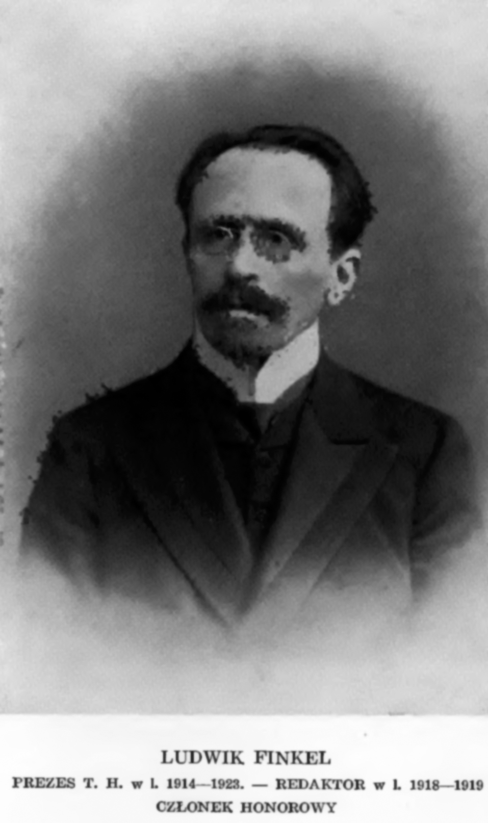 Ludwik Michał Emanuel Finkel - polski historyk, bibliograf, profesor